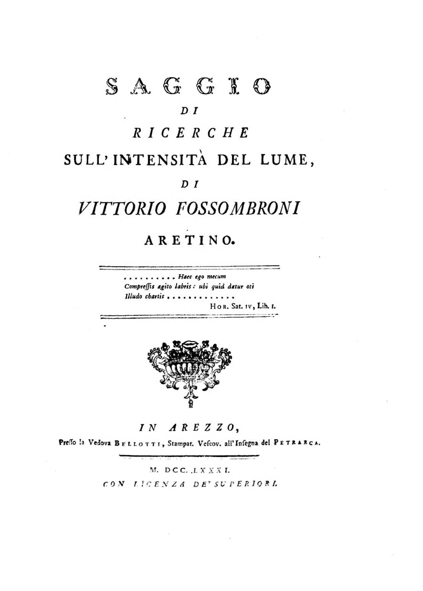 Saggio di ricerche sull'intensità del lume, di Vittorio Fossombroni …. - In Arezzo : presso la vedova Bellotti, stampat. all'Insegna del Petrarca, 1781. - XXVIII, 112 p., [1] c. di tav. incisa ; 2° . Frontespizio